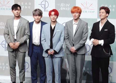 4일 오후 3시 서울 강남구 압구정 일지 아트홀에서는 틴탑의 새 앨범 ‘DEAR. N9NE(디어나인)’ 발매 기념 프레스 쇼케이스가 진행됐다.